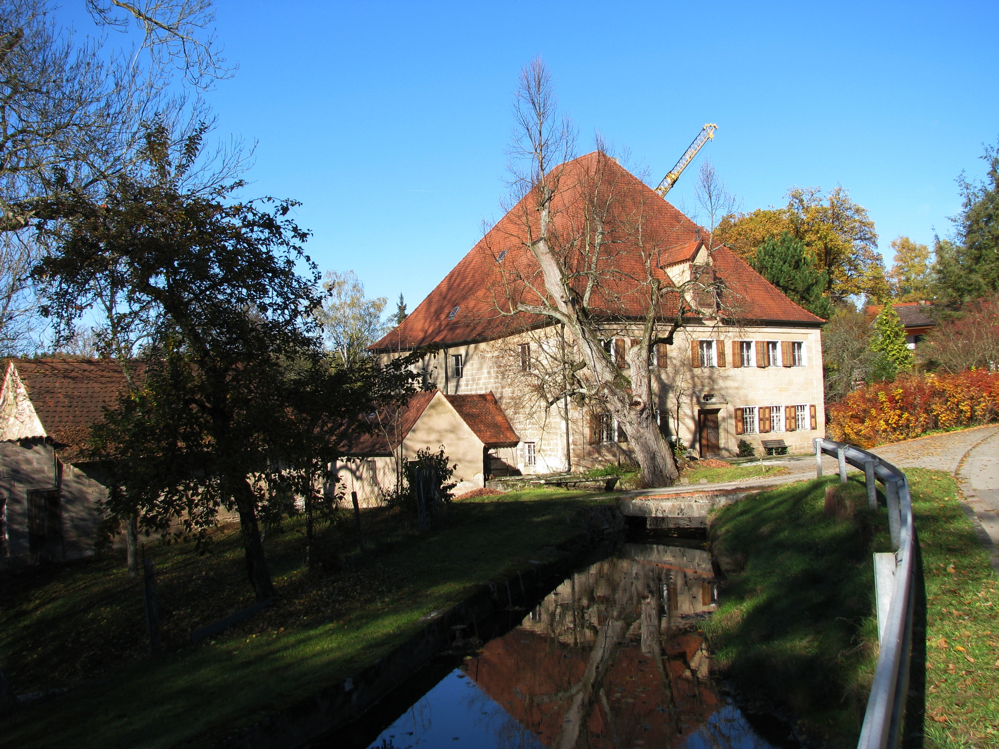 Hofstetten, Ortsteil von Hilpoltstein im mittelfränkischen Landkreis Roth, ehemalige Mühle (Mitte 18. Jahrhundert)